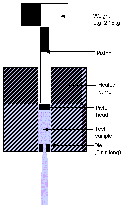 Unknown language: شمای کلی اندازه گیری شاخص جریان مذاب